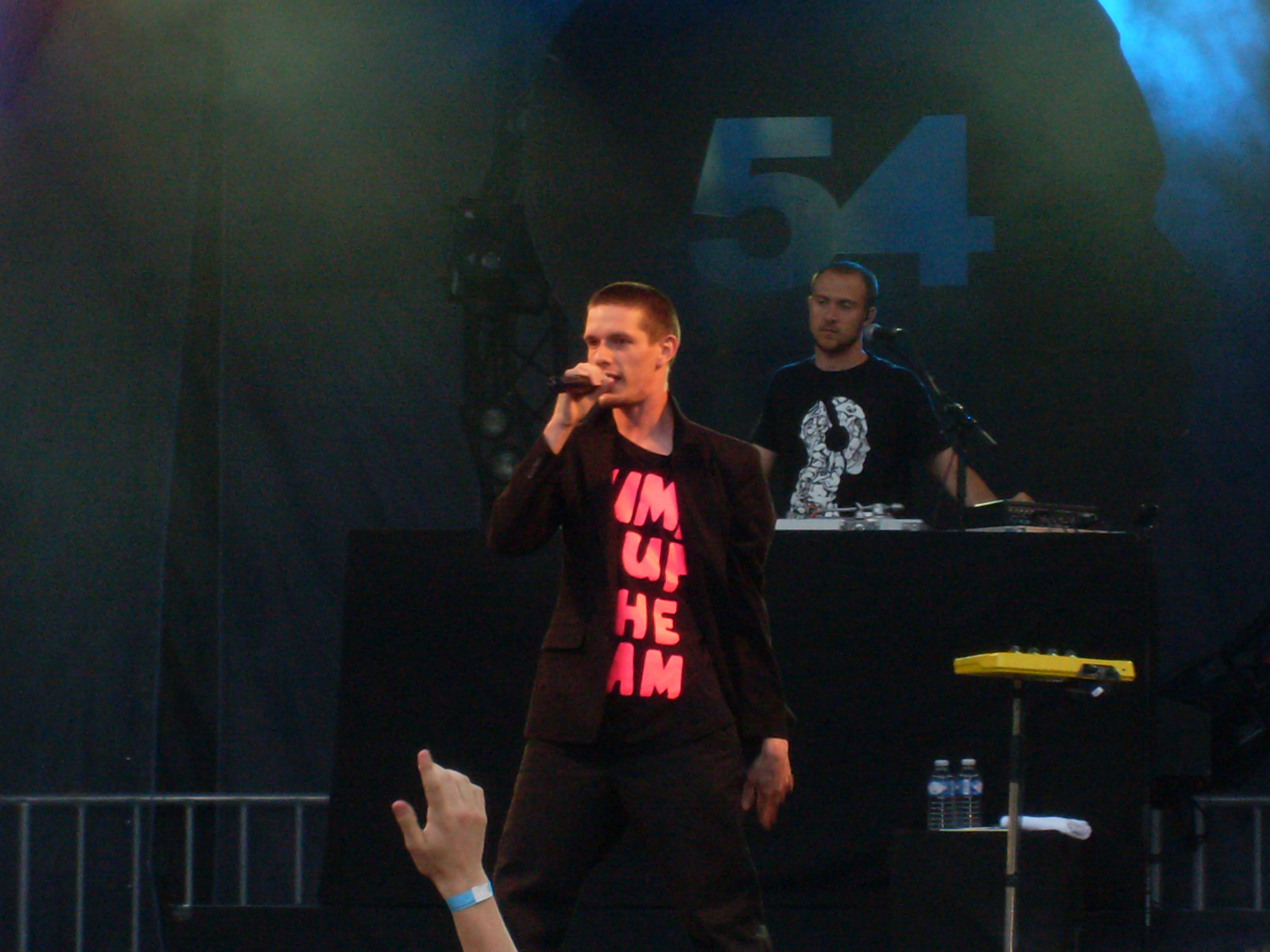 20Syl et Dj Greem